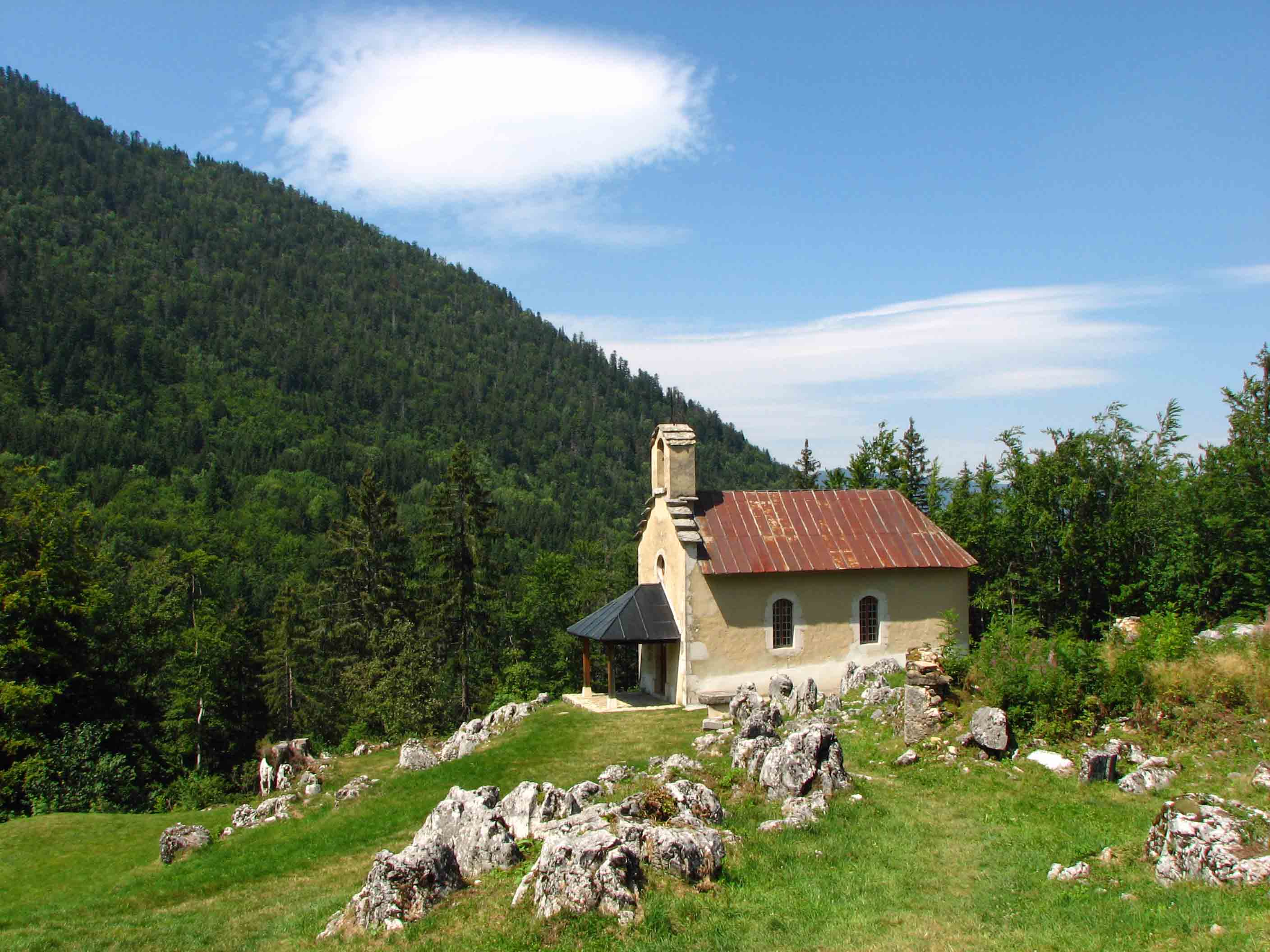 Chapelle de Valchevrière, Isère, France